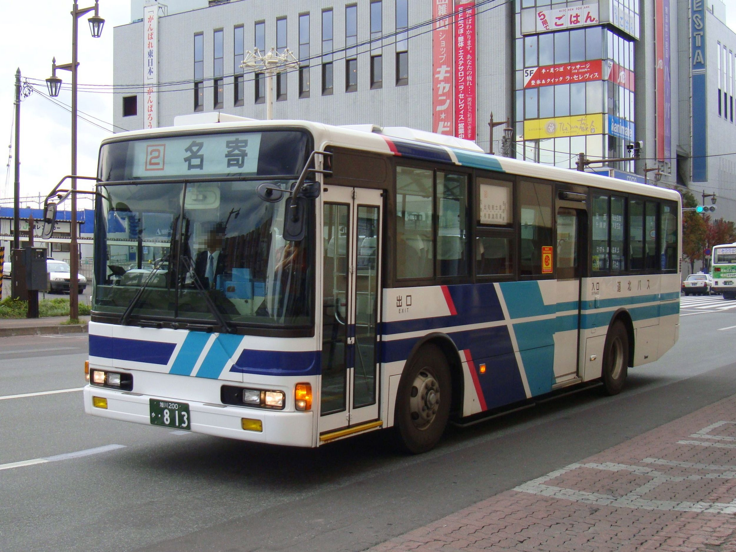 Asahikawa to Nayoro